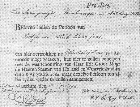 In deze akte verplichtten de samenwerkende armbesturen van "Anthonij-Polder" om de vijfentwintigjarige Soetje van Luik, die verhuisde naar Cillaarshoek, indien zij "tot Armoede mogt geraken" bij een eventueel terugkeren naar St. Antoniepolder weer te zullen aannemen. 05-04-1795, Saamgevoegde Armbezorgers van Anthonij Polder, Soetje van Luik, oud 25 jaar.